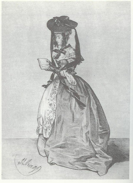 Marie Dorval dans le rôle de Kitty Bell, par Jacques Arago,1835.